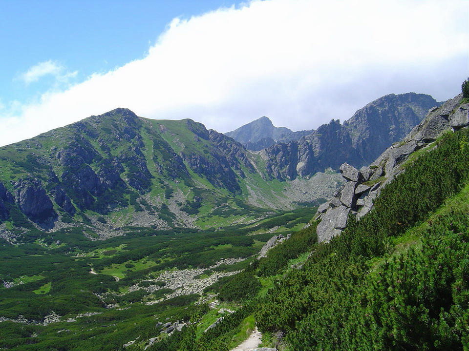 Sedielkova kopa (left), Ostra (right) and Krivan (middle)